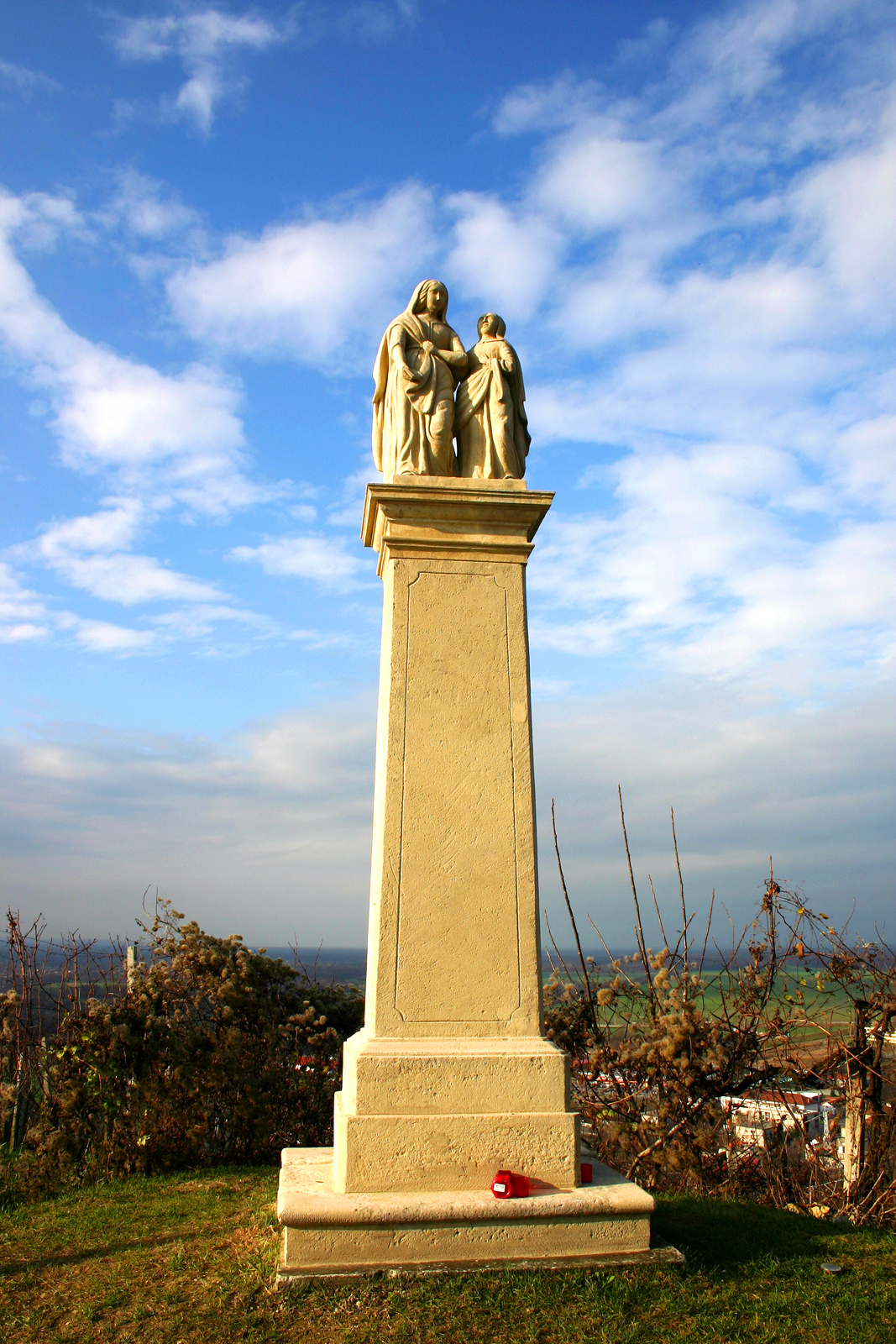 Znamenje s kipoma svete Ane in Marije v Lendavskih Goricah. Izdelano je v baročni tradiciji in je bilo postavljeno v 19. stoletju. Stoji pred zahodnim pročeljem cerkve sv. Trojice, tik ob cesti. Viri: Register nepremične kulturne dediščine © Ministrstvo za kulturo